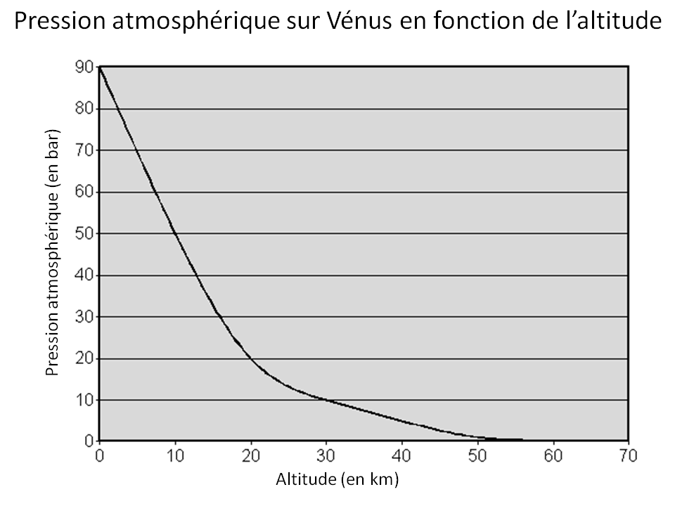 Pression atmosphérique sur Vénus en fonction de l'altitude.